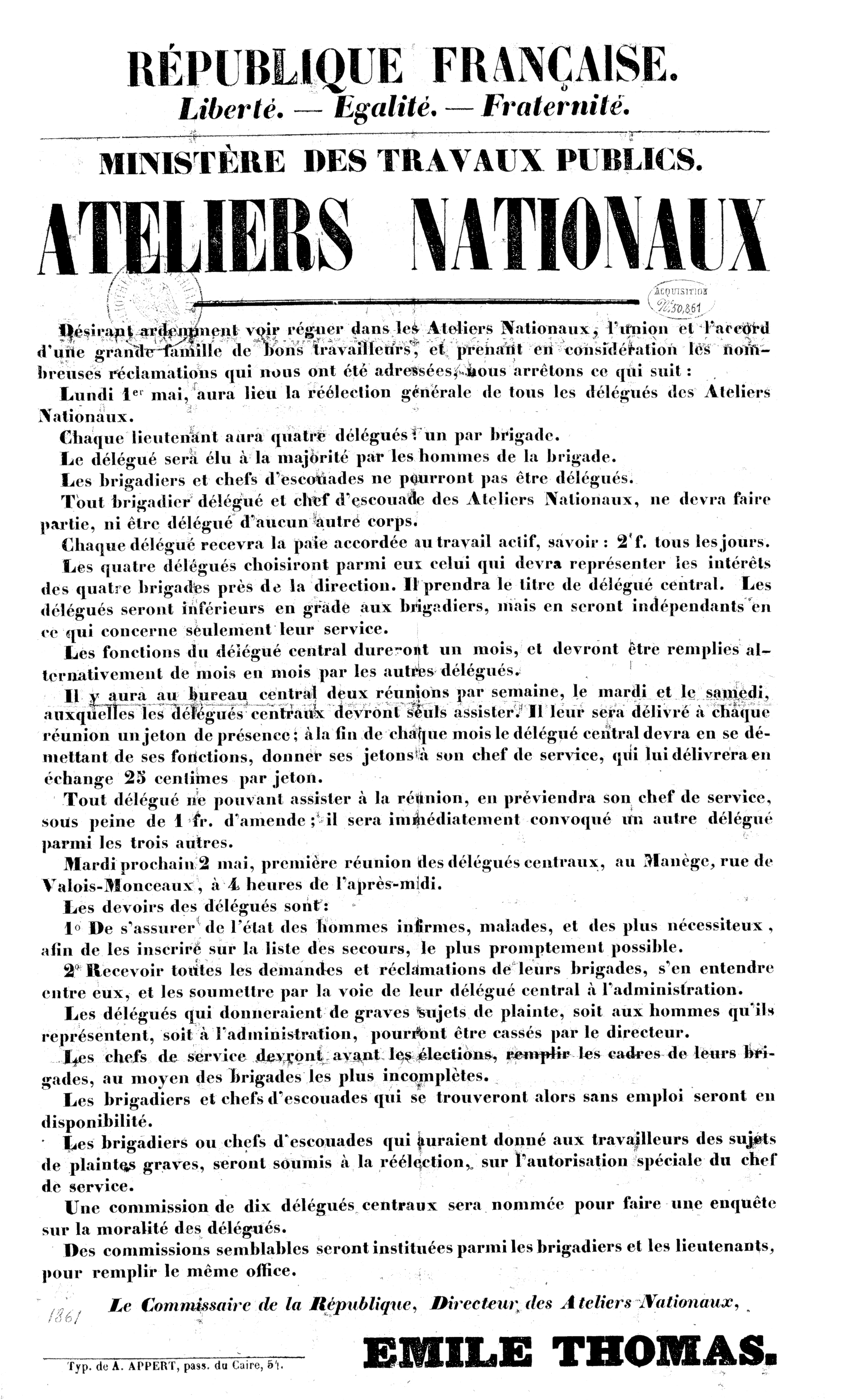 Organisation des Ateliers nationaux par Émile Thomas, premier directeur des Ateliers nationaux, Paris, 1848